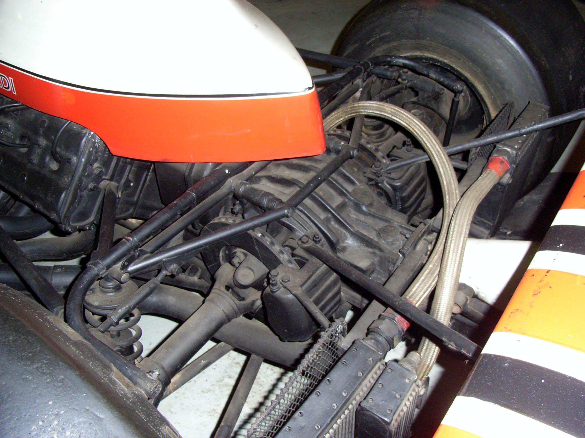 McLaren M23's rear sectionOwner: Museu do Automóvel do Paraná, Curitiba